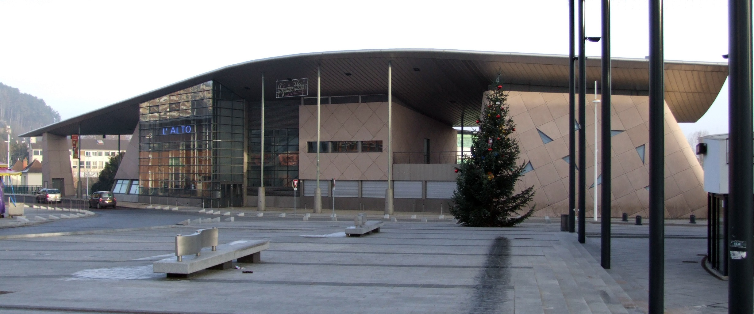 L'Alto, Le Creusot, Saône-et-Loire, Bourgogne, FRANCE